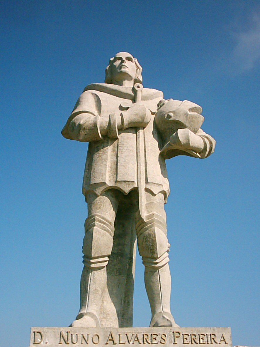 Estátua de Dom Nuno Álvares Pereira frente ao Castelo de Ourém, em Ourém, Portugal.